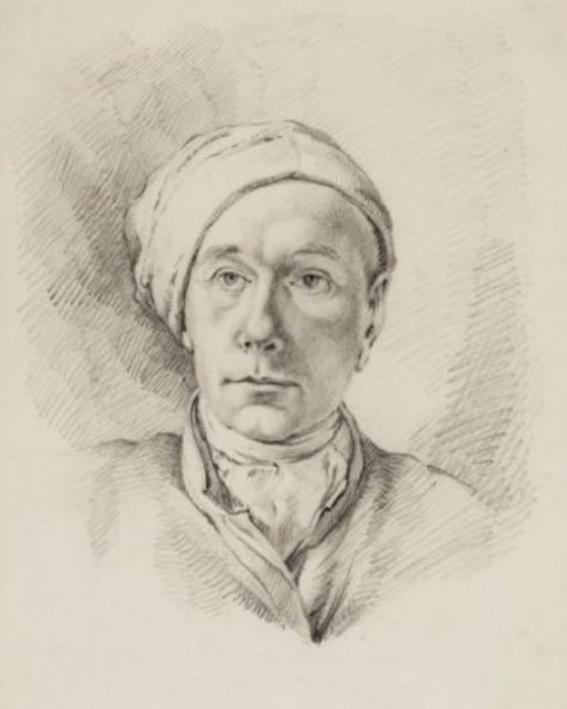 zelfportret Jacob Cats